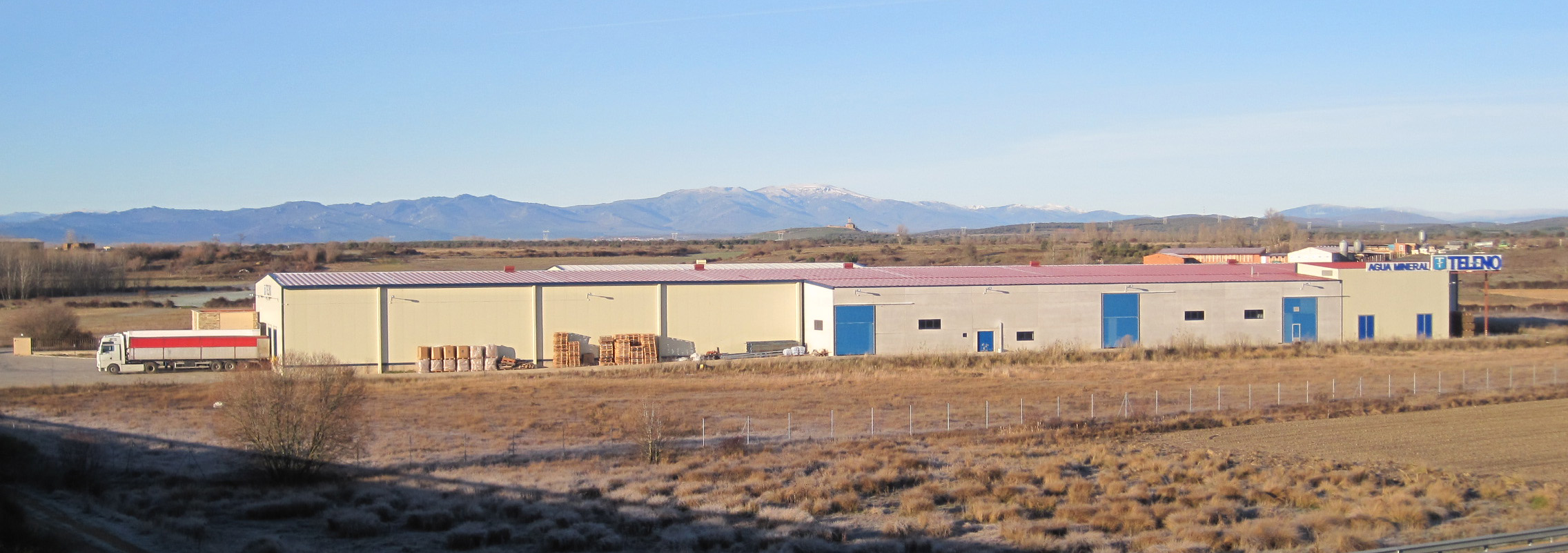 Planta embotelladora de agua mineral Teleno, en Palacios de la Valduerna (León, España).